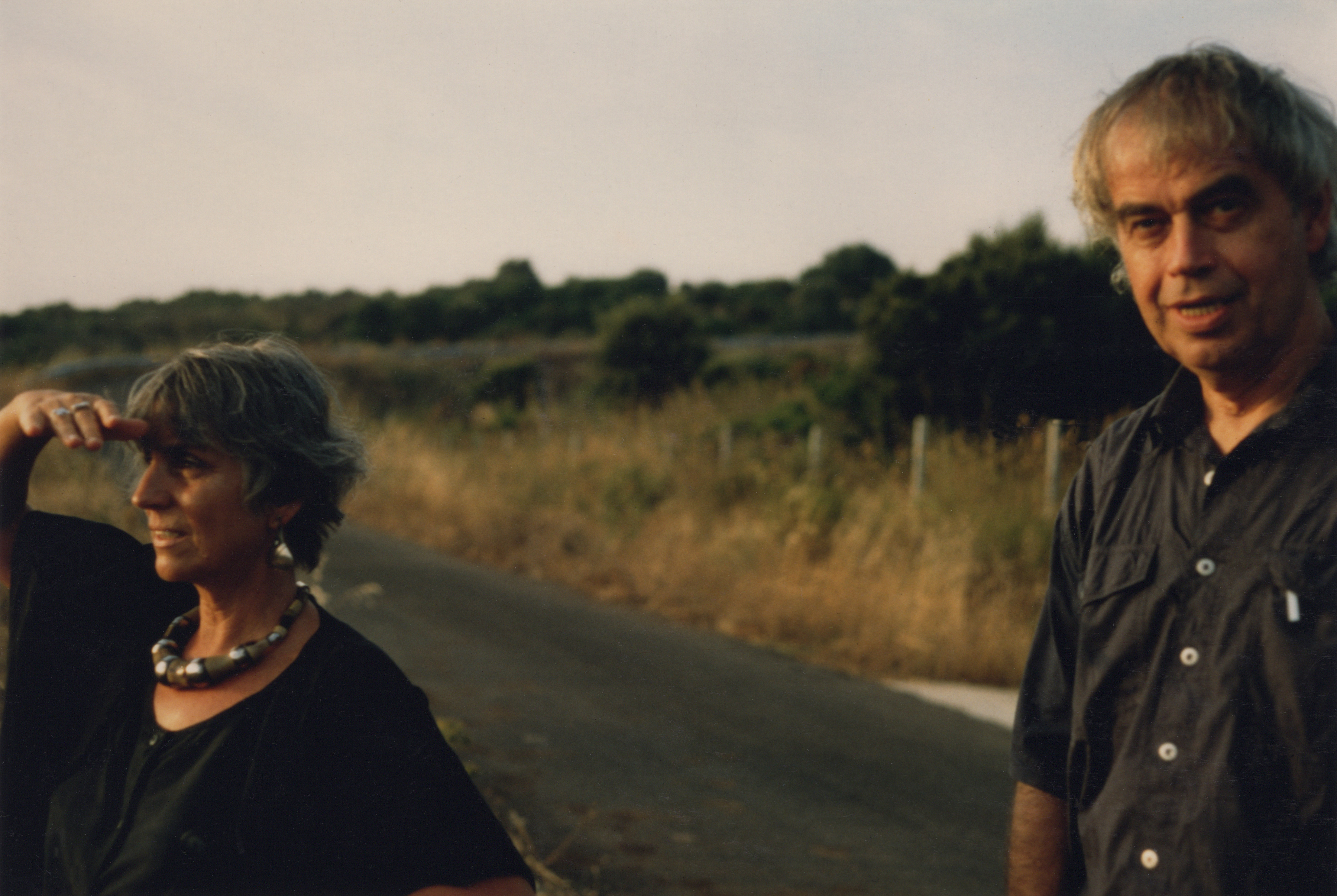 Das Künstlerehepaar Rosemarie Beuermann-Würth und Wilhelm Beuermann, um 1997 in Sardinien ...